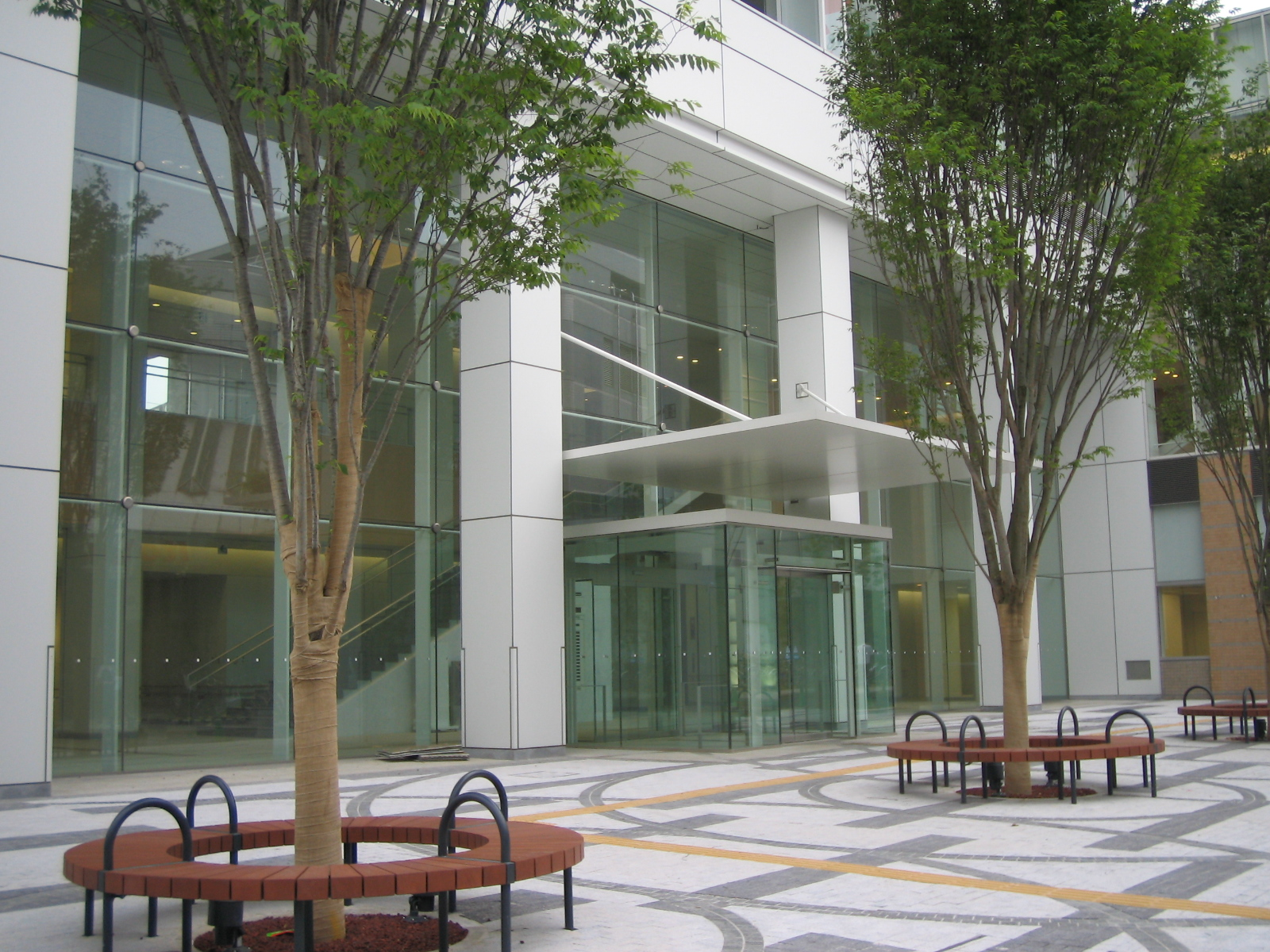 けやきプラザ正面 撮影者: Cojilo